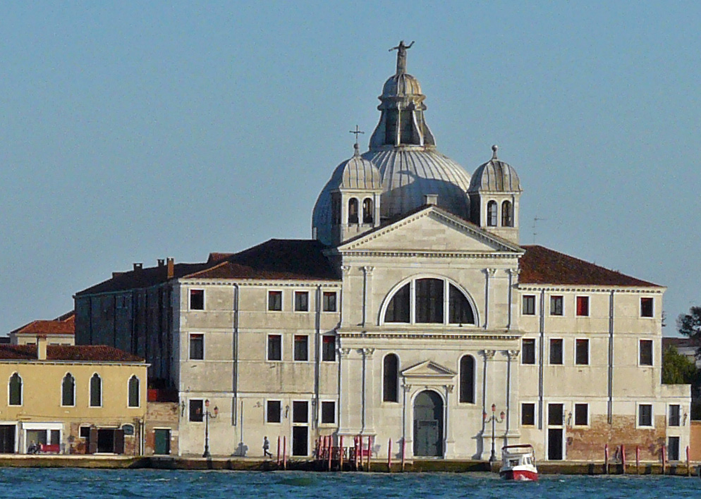 Le Zitelle from near Piazza San Marco (Venice).